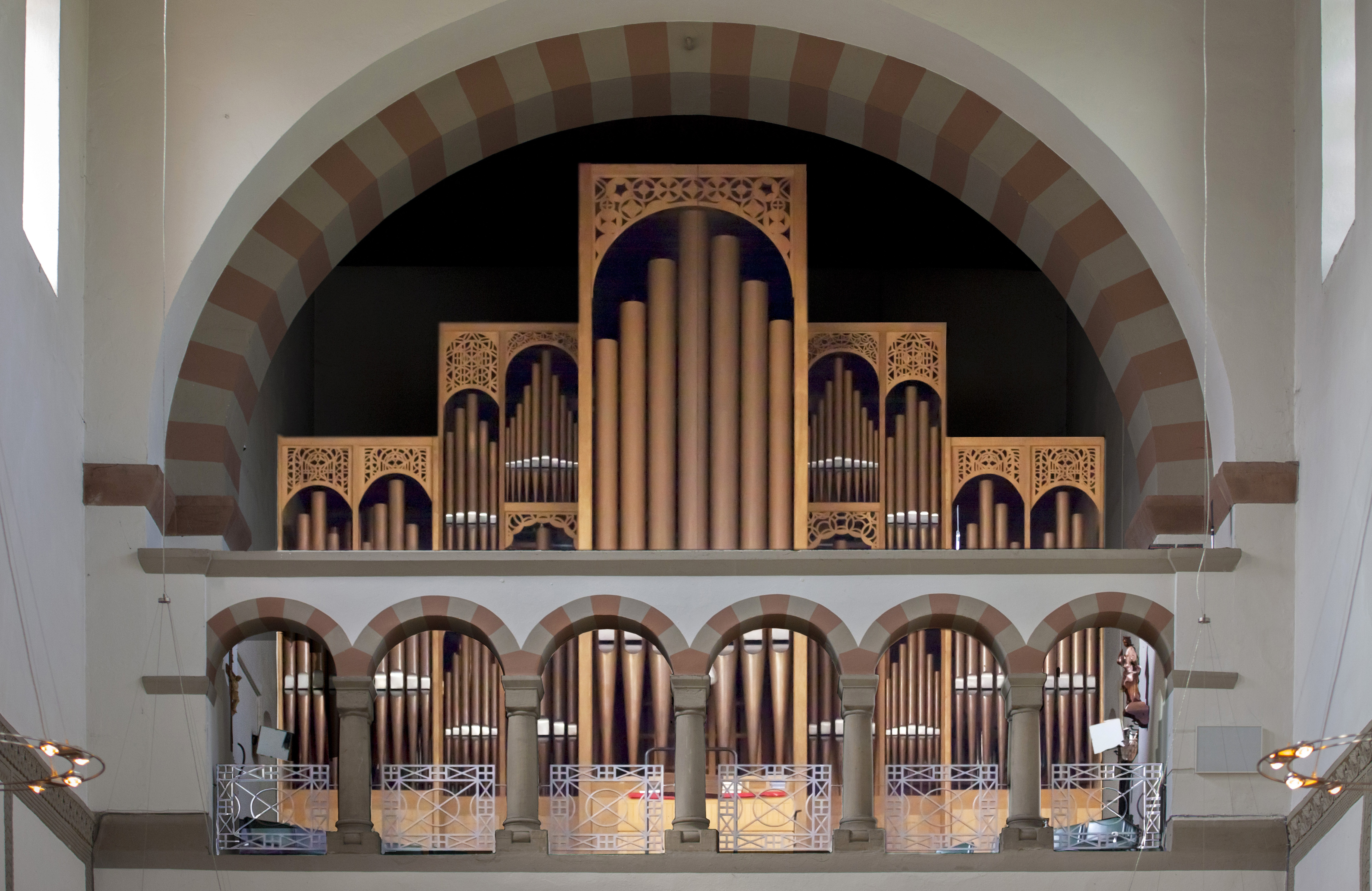 Lobback Orgel St. Antonius Basilika, Rheine